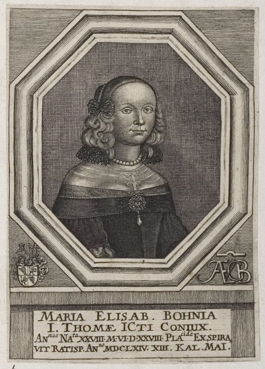 Grafik aus dem Klebeband Nr. 3 der Fürstlich Waldeckschen Hofbibliothek Arolsen Motiv: Maria Elisabeth Thomae geb. Bohn (1635–1664 in Regensburg), Tochter des Reichshofrats von Bohn; erste Ehefrau des Juristen und Gesandten für Sachsen-Altenburg am Reichstag in Regensburg Johannes Thomae. Epitaph auf dem Gesandtenfriedhof bei der Dreieinigkeitskirche (Regensburg)